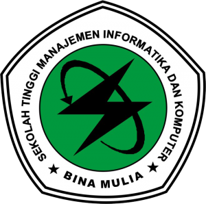 Logo Universitas STMIK Bina Mulia Palu